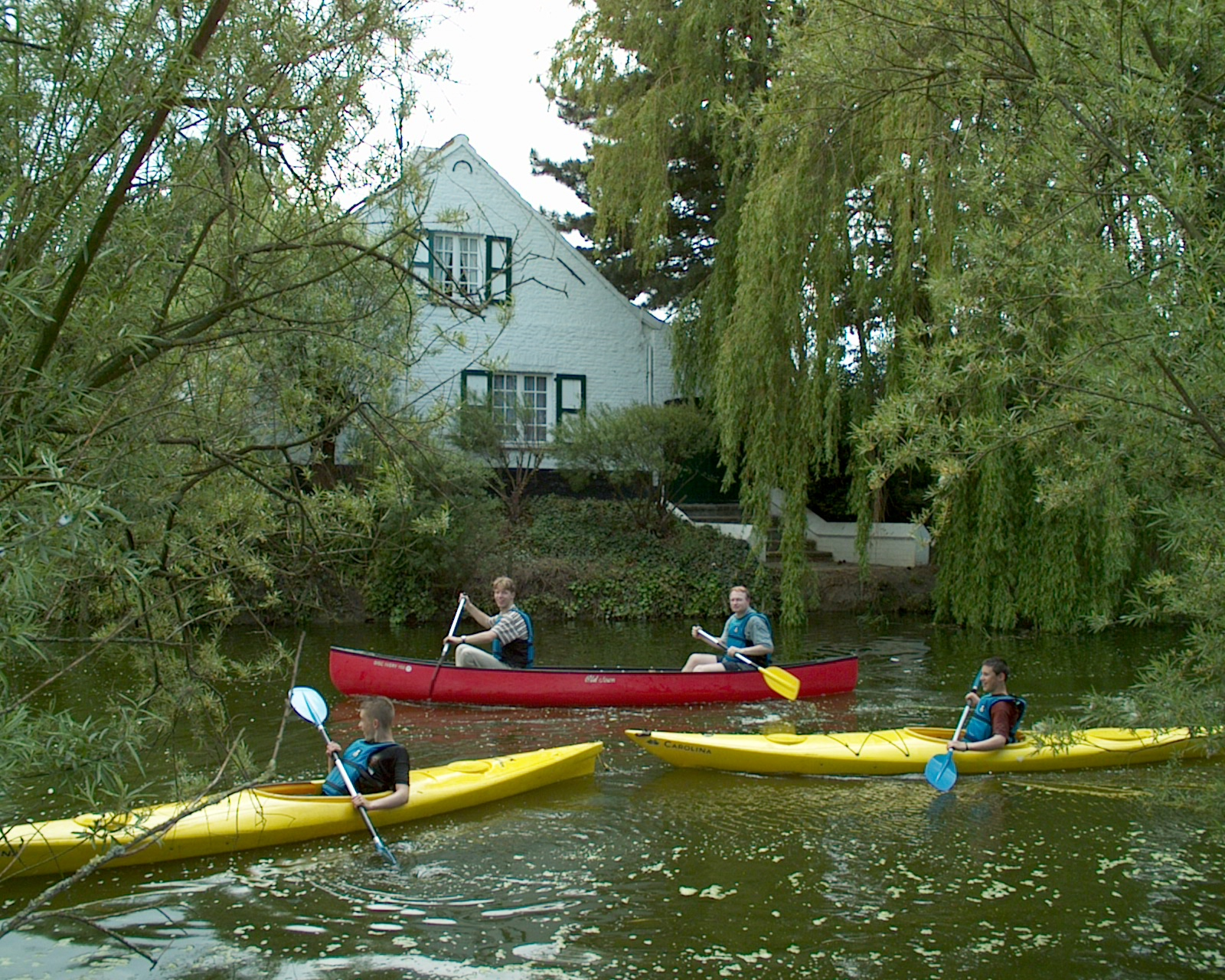 Kanovaren op de IJzer nabij Stavele. Dit is tevens een eigen foto